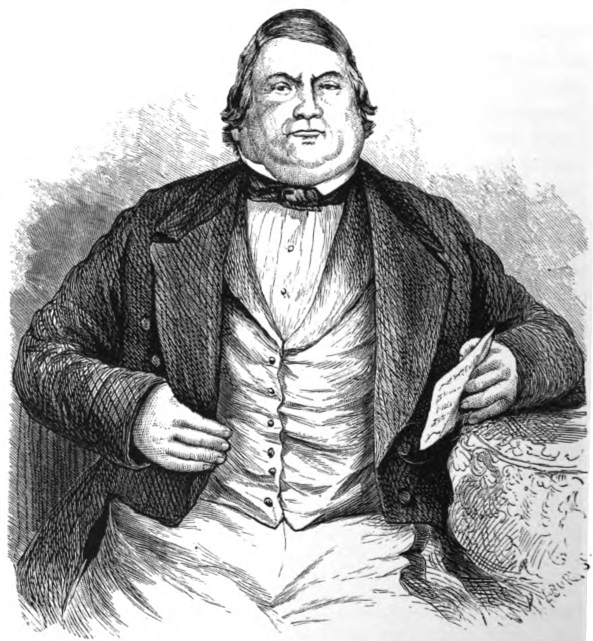 Carlos Antonio Lopez